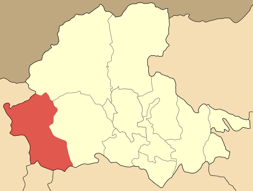 Locator map of Vegoritidos municipality (Δήμος Βεγορίτιδος) at Pellas perfecture, Macedonia, Greece.